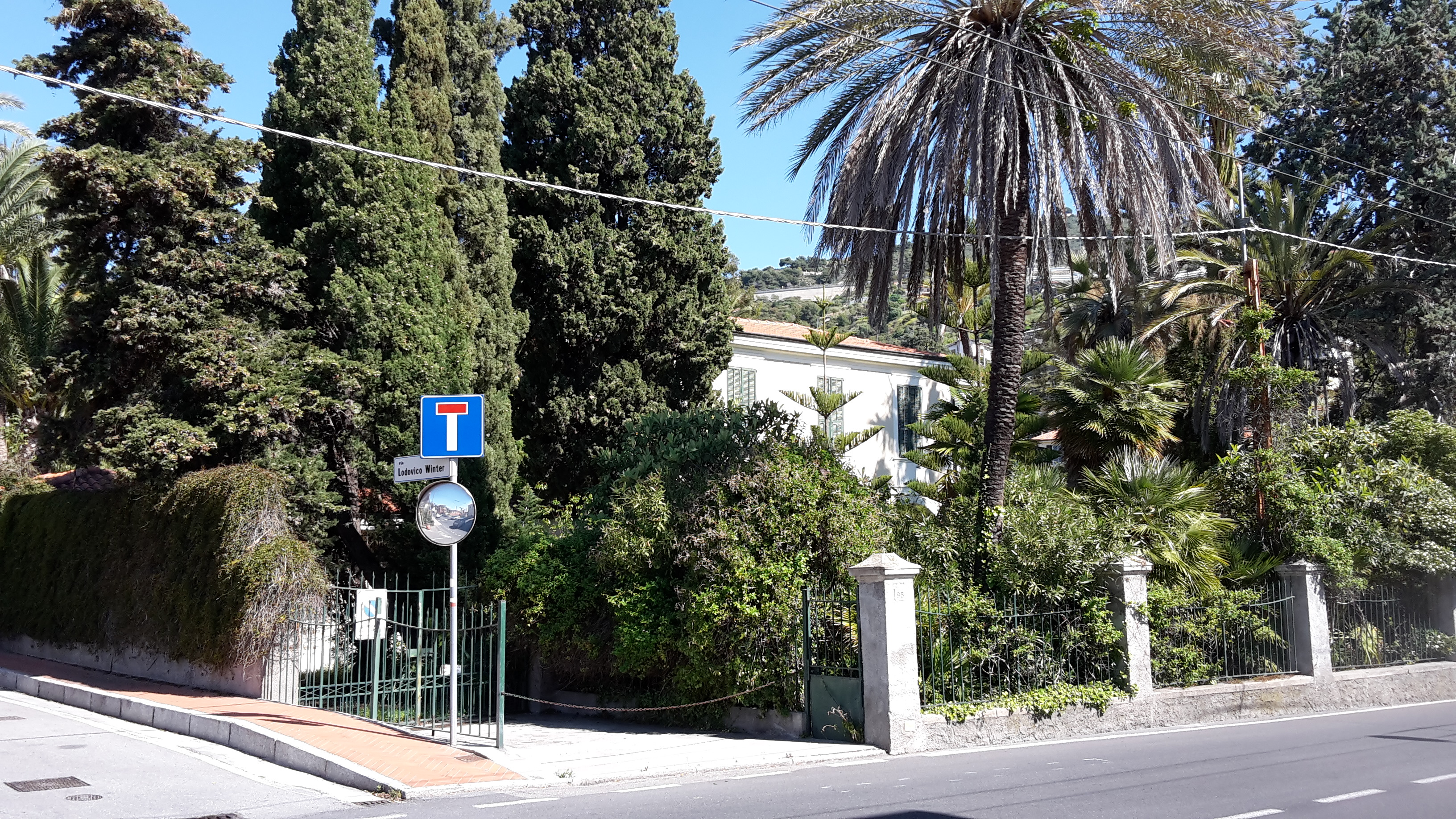 Villa Llo di Mare, via arziglia 97 Bordighera. Abitata da L. Winter, G. Porcheddu